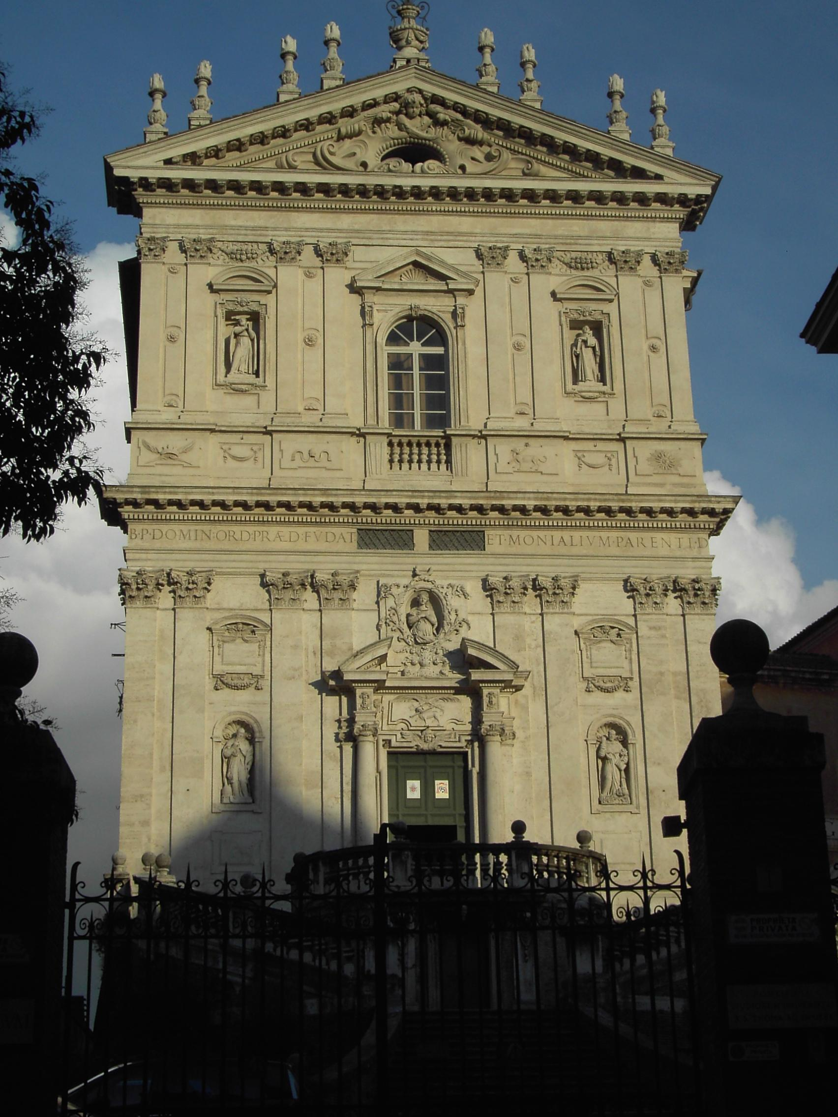 Roma , santi Domenico e Sisto (Angelicum) Object location41° 53′ 45.35″ N, 12° 29′ 15.83″ E